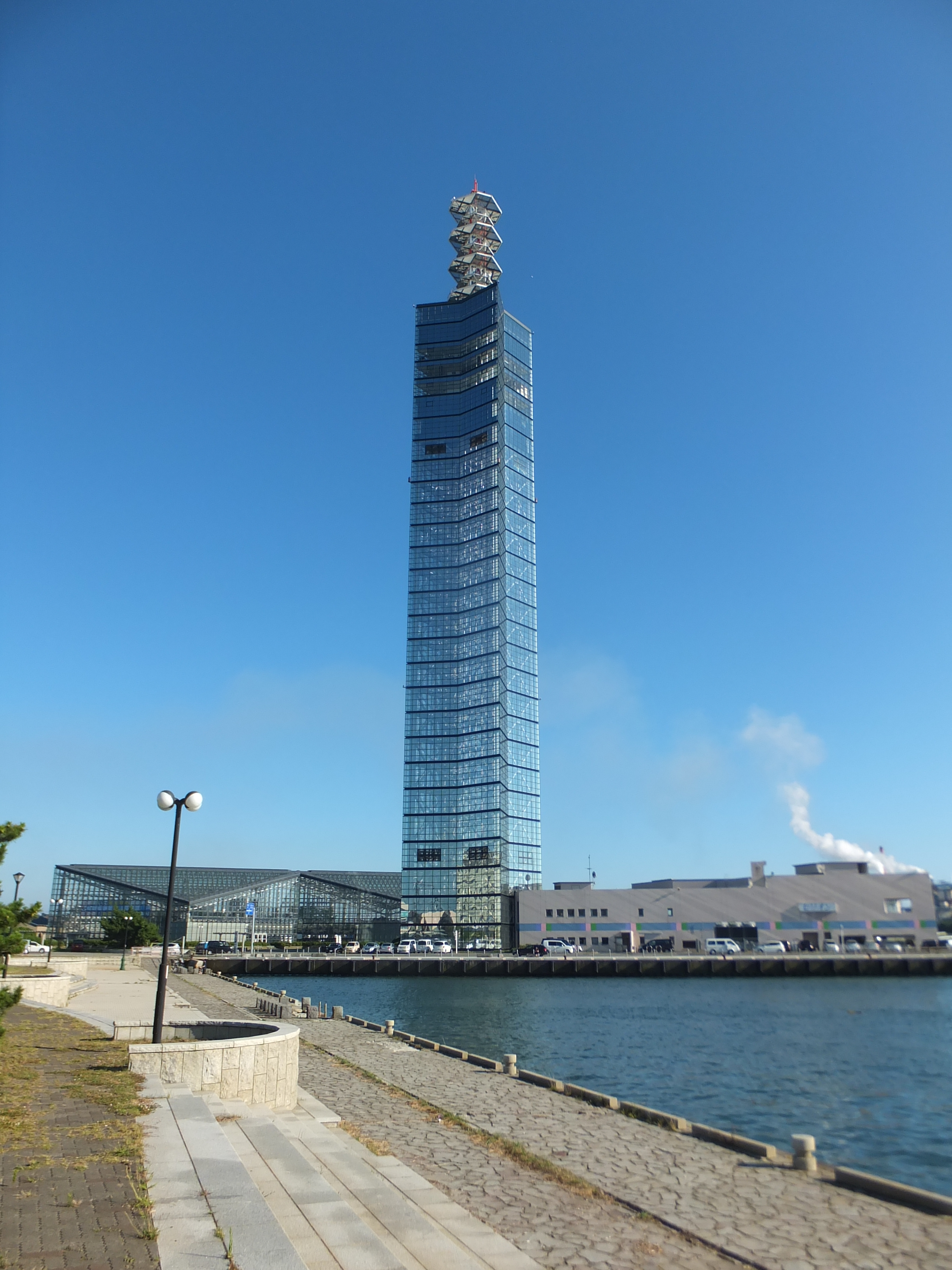 秋田ポートタワー・セリオン。県による秋田港の長期計画では、この画面内の水域を埋め立てて、セリオンの前をクルーズ客船のボーディングブリッジとする構想がある。